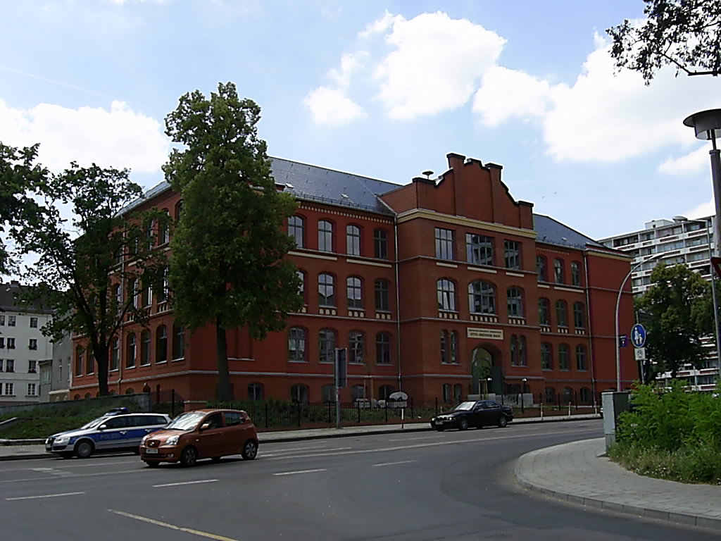 Otto-Brenner Gymnasium